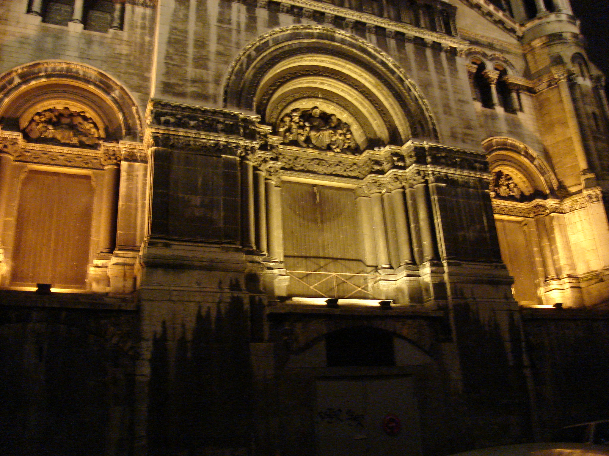 Les portes de l'église du Bon-Pasteur débouchent à 3m du sol...